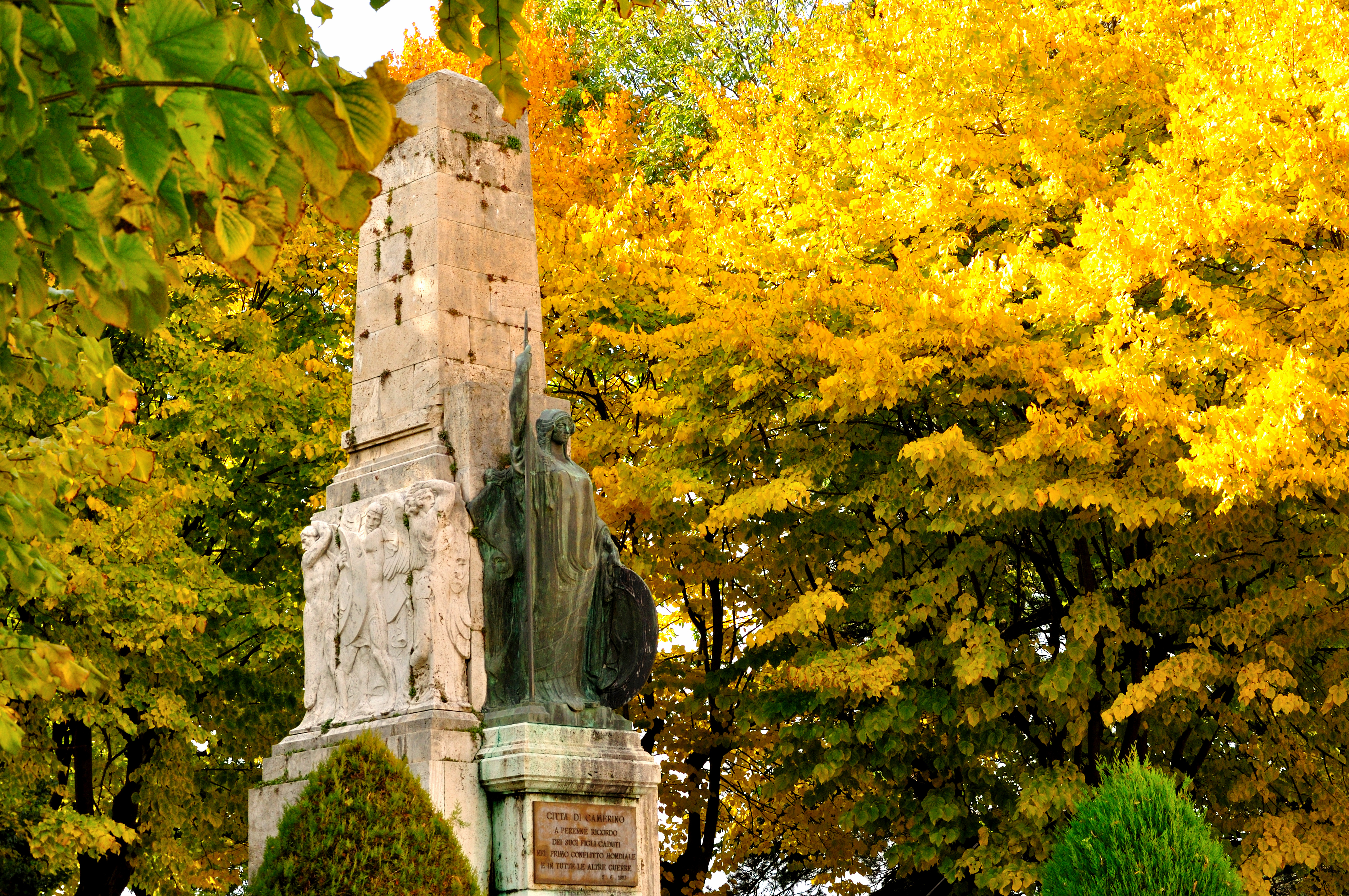 Monumento ai caduti in Piazzale della Vittoria - Camerino (MC)